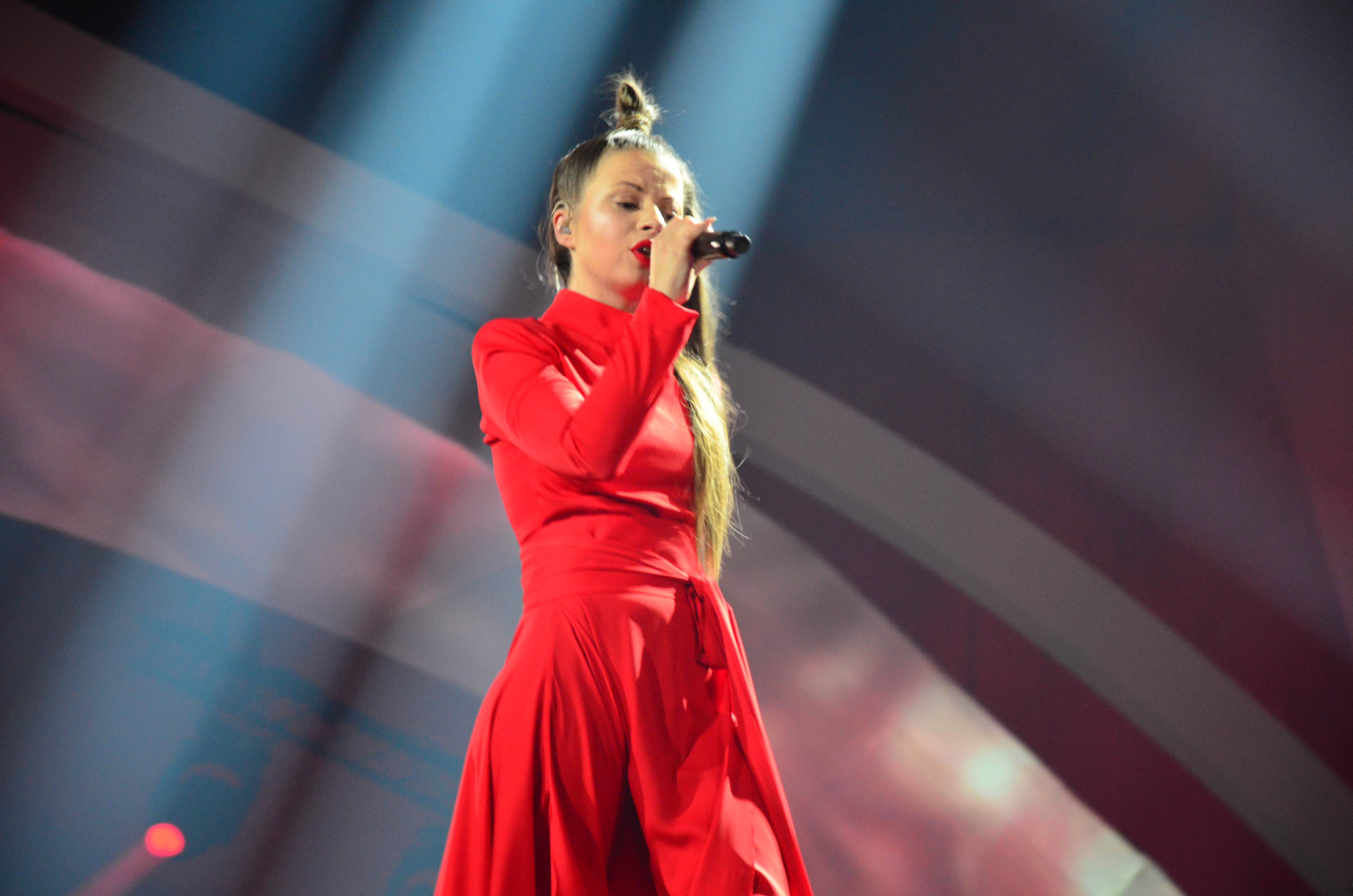 10 травня 2017 року у Києві відбулась генеральна репетиція 2 півфіналу "Євробачення".